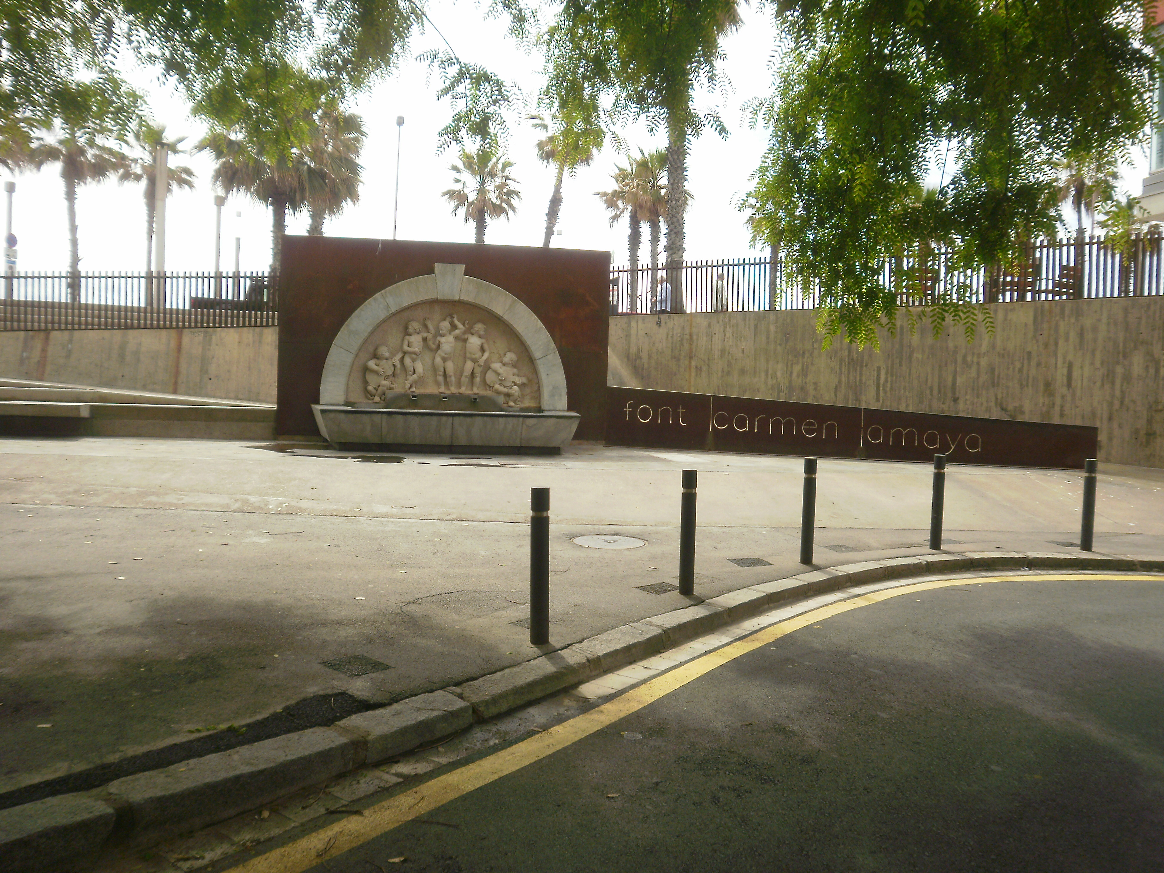 Fonts de Carmen Amaya